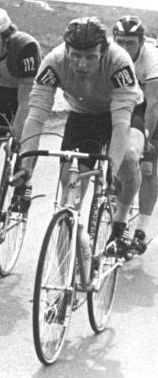 Stier, Petermann, Macha, Köhler ADN-ZB Ludwig-26.4.81 Erfurt: Mit dem Gesamterfolg von Andreas Petermann (SC DHFK Leipzg-2.v.l.) endete die VII. Thüringen-Radrundfahrt. Hier während der Abschlußetappe Rund um die Hainleite über 208 km. Detlef Macha (SC Turbine Erfurt). Abgebildete Personen: Macha, Detlef: Radsportler, DDR